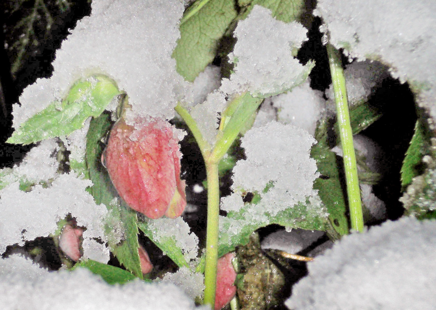 Helleborus niger, Schneerose oder auch Christrose